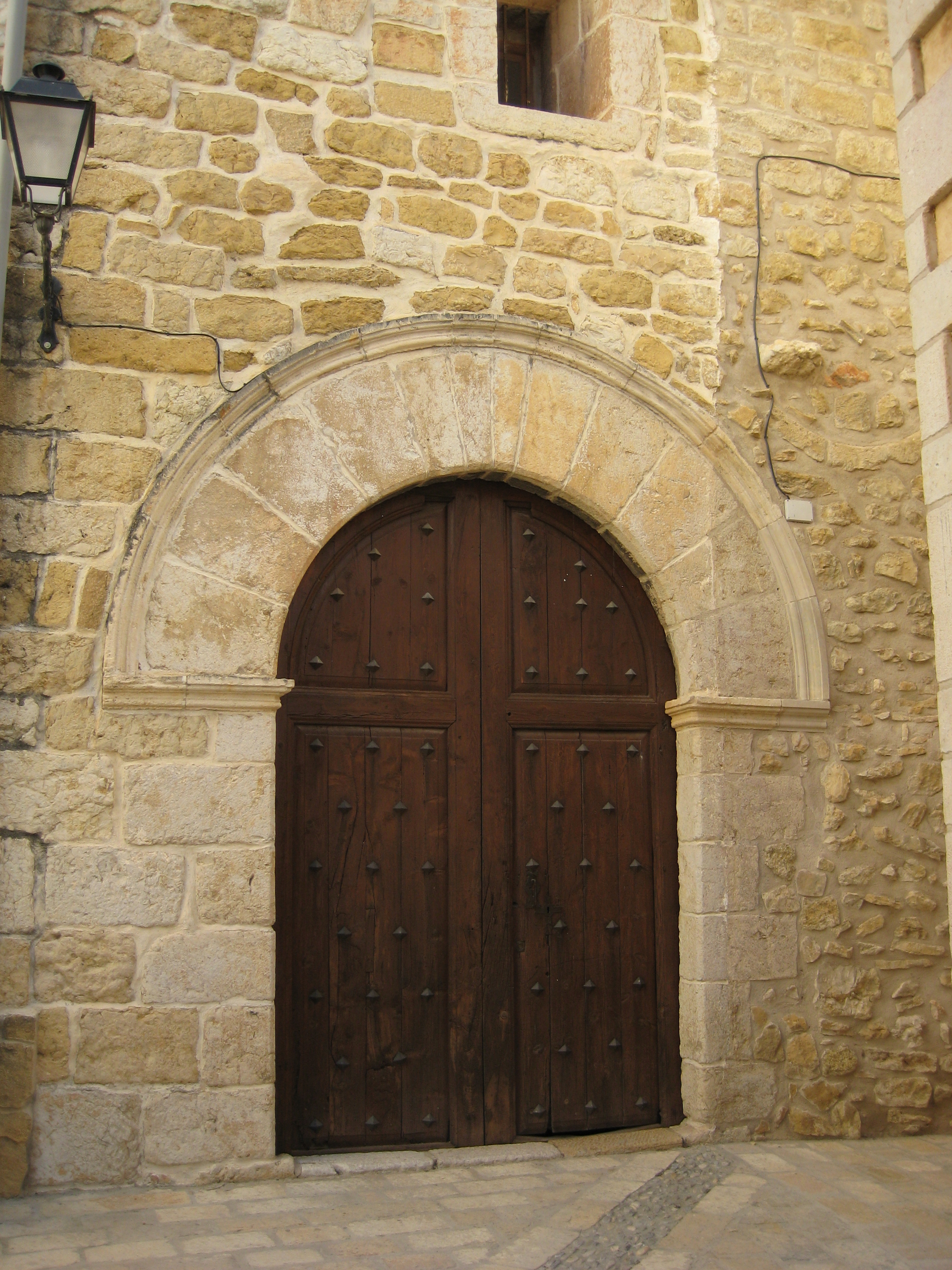 Portada de l'església de l'Assumpció de Cervera del Maestrat (Baix Maestrat)